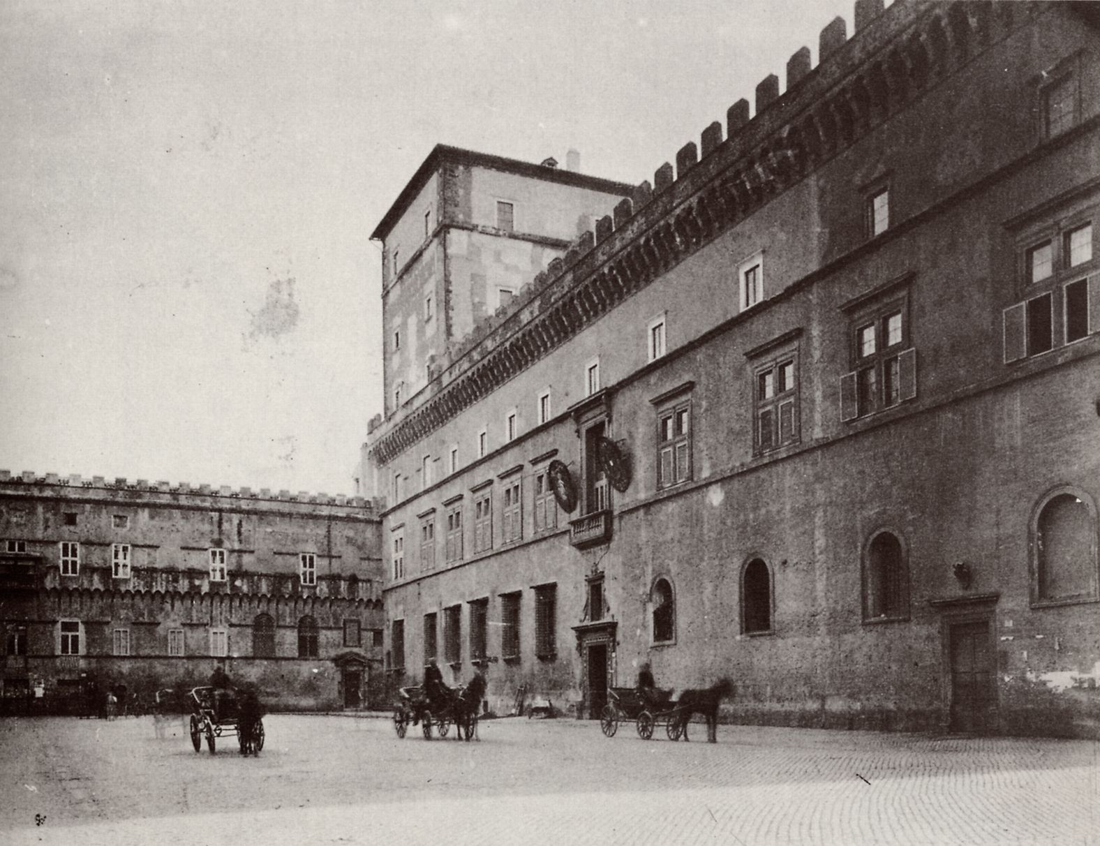 Parker, John Henry: Piazza Venezia